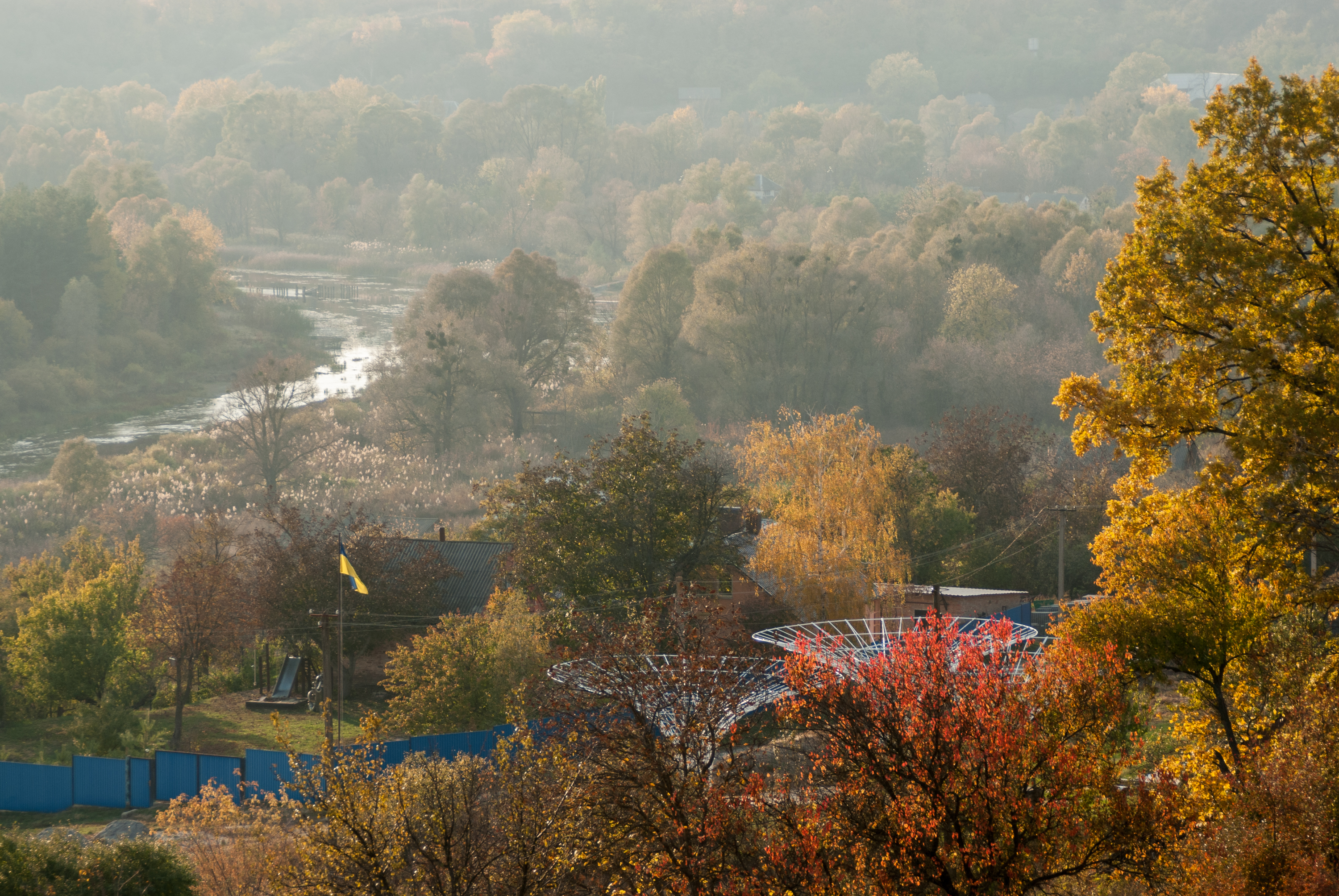 Осінній вид на Удай біля села Курінька, Чорнухинського району, Полтавської області.